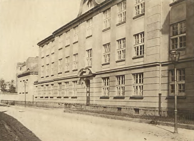 Szkoła przy ul. Karolkowej 64 w Warszawie